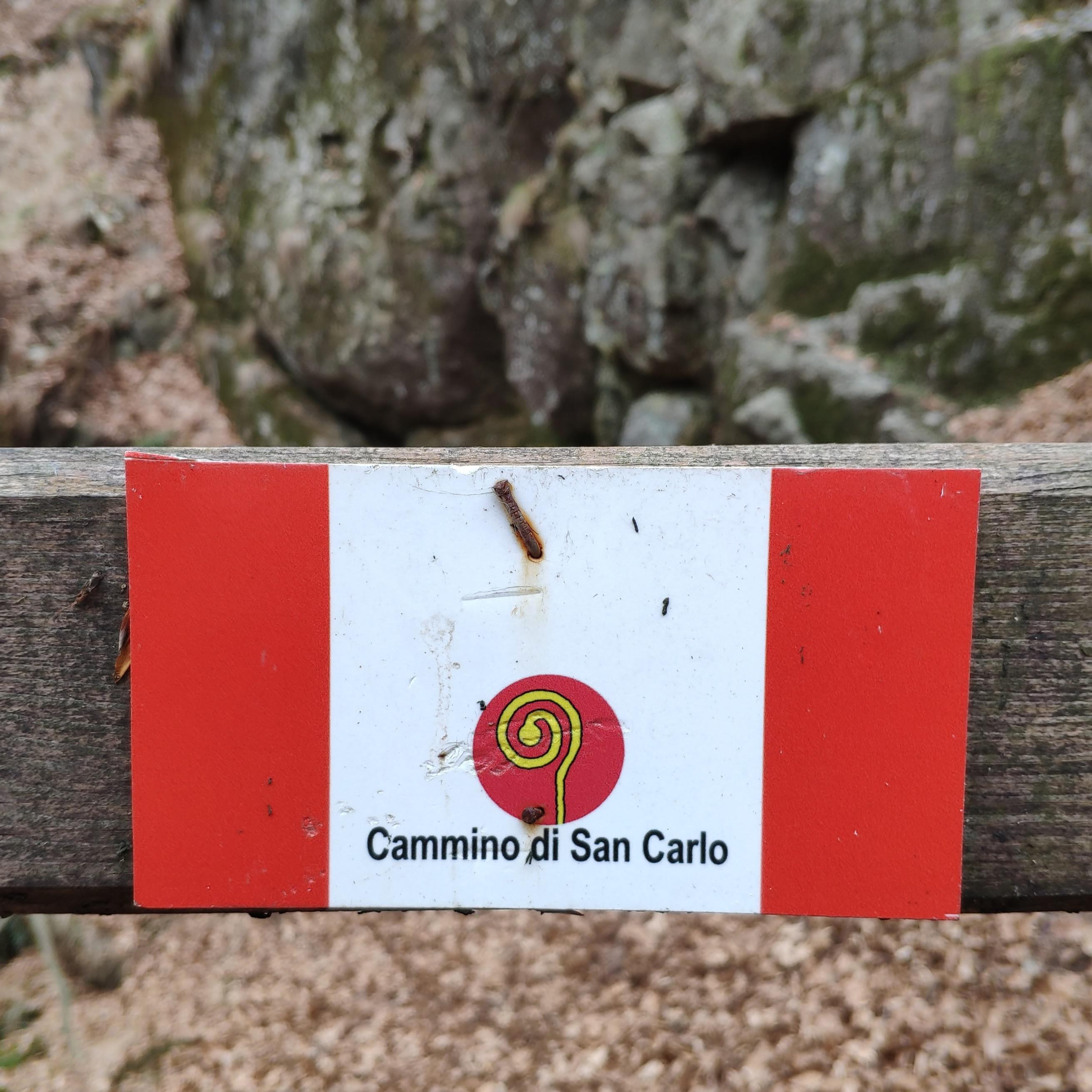 Indicazioni sul sentiero del Cammino di San Carlo